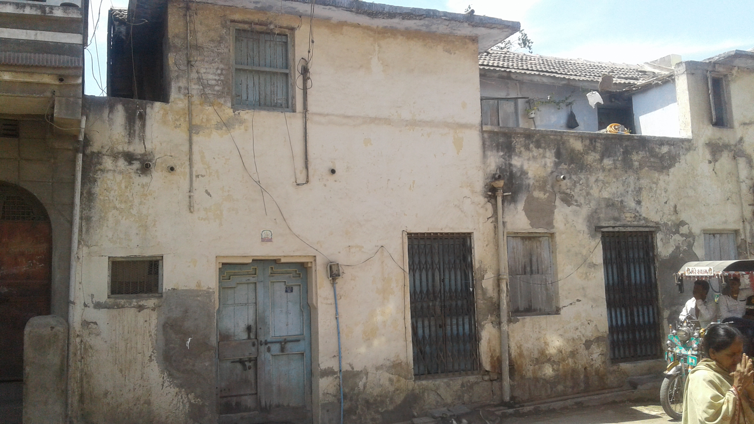 ગુજરાતી: ગુજરાતના પ્રથમ મુખ્યમંત્રી ડૉ.જીવરાજ મહેતાનું અમરેલી સ્થિત નિવાસસ્થાન.